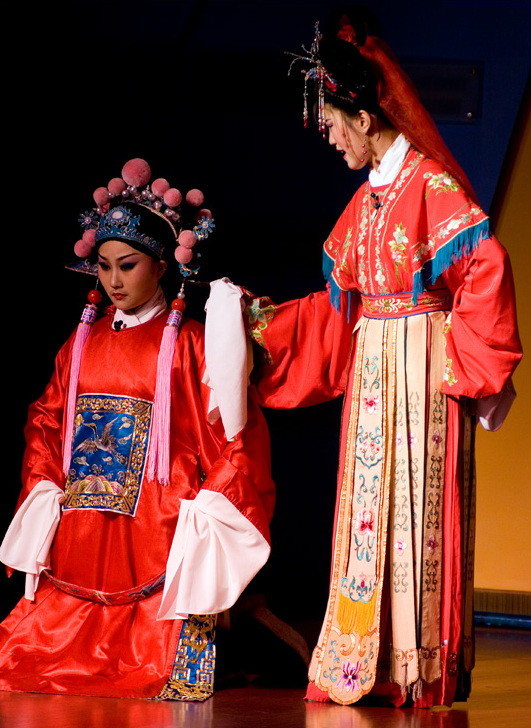 Huangmei Opera in ShanghaiGuangdong Huangmei Opera in Shanghai